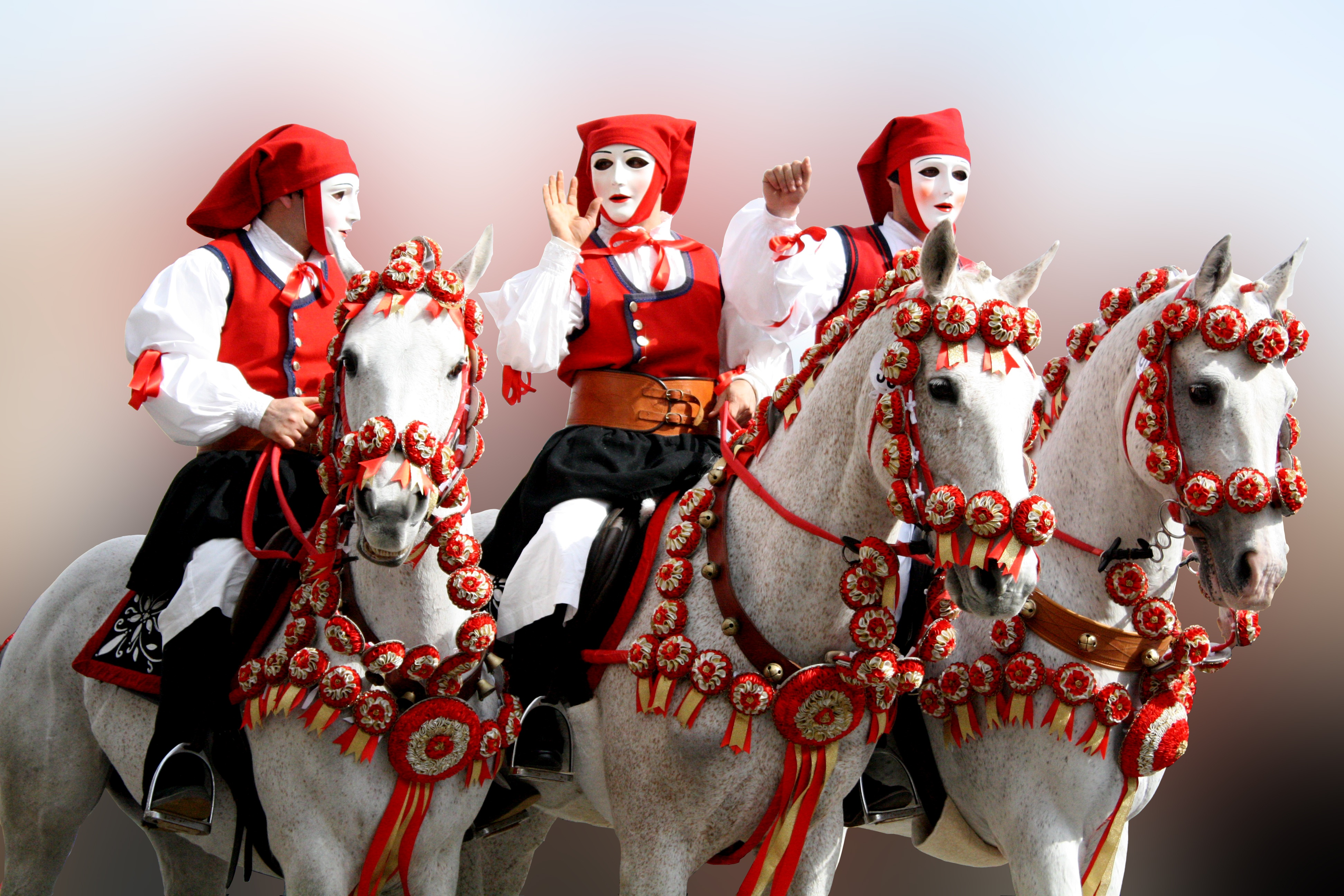 La Sartiglia (Sartilla o Sartilia) è una corsa all'anello di origine medievale (1358)[senza fonte] che si corre l'ultima domenica e il martedì di carnevale ad Oristano. È una fra le più spettacolari e più coreografiche forme di Carnevale della Sardegna. Ricordi sfumati di duelli e Crociate, colori spagnoleschi, echi di nobiltà decaduta e costumi agro pastorali.